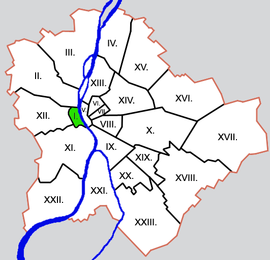 Budapest kerületei: I. kerület